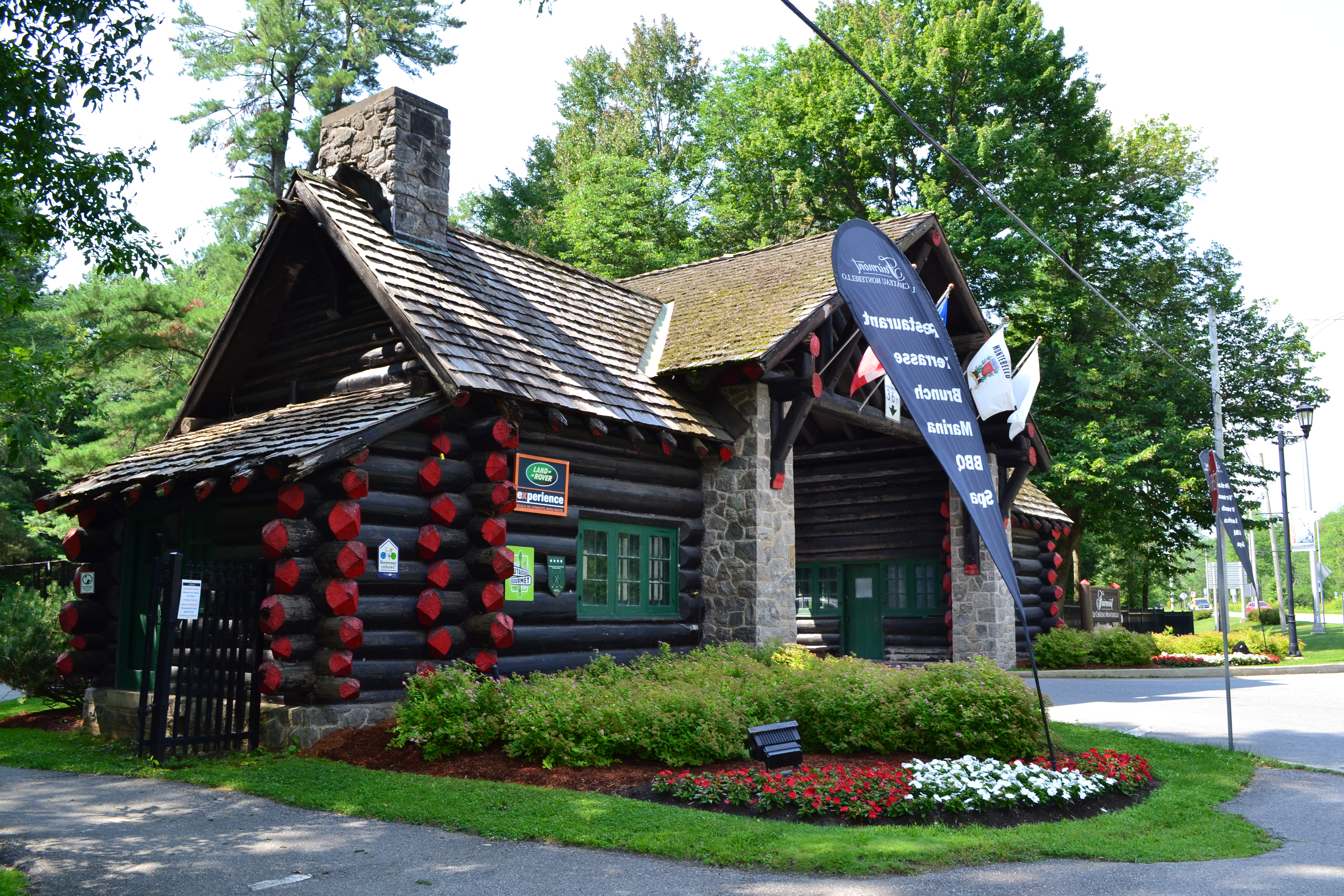 Entrée principale du château Montebello à Montebello au Québec.